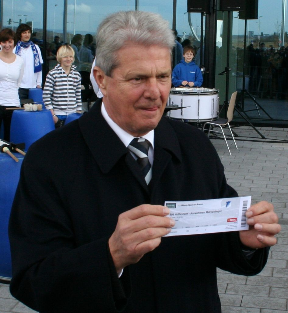 Dietmar Hopp mit seiner Eintrittskarte, mit der Hopp die Rhein-Neckar-Arena kurz vor dem Fußballspiel TSG 1899 Hoffenheim gegen eine Metropolregion-Auswahl symbolisch eröffnete